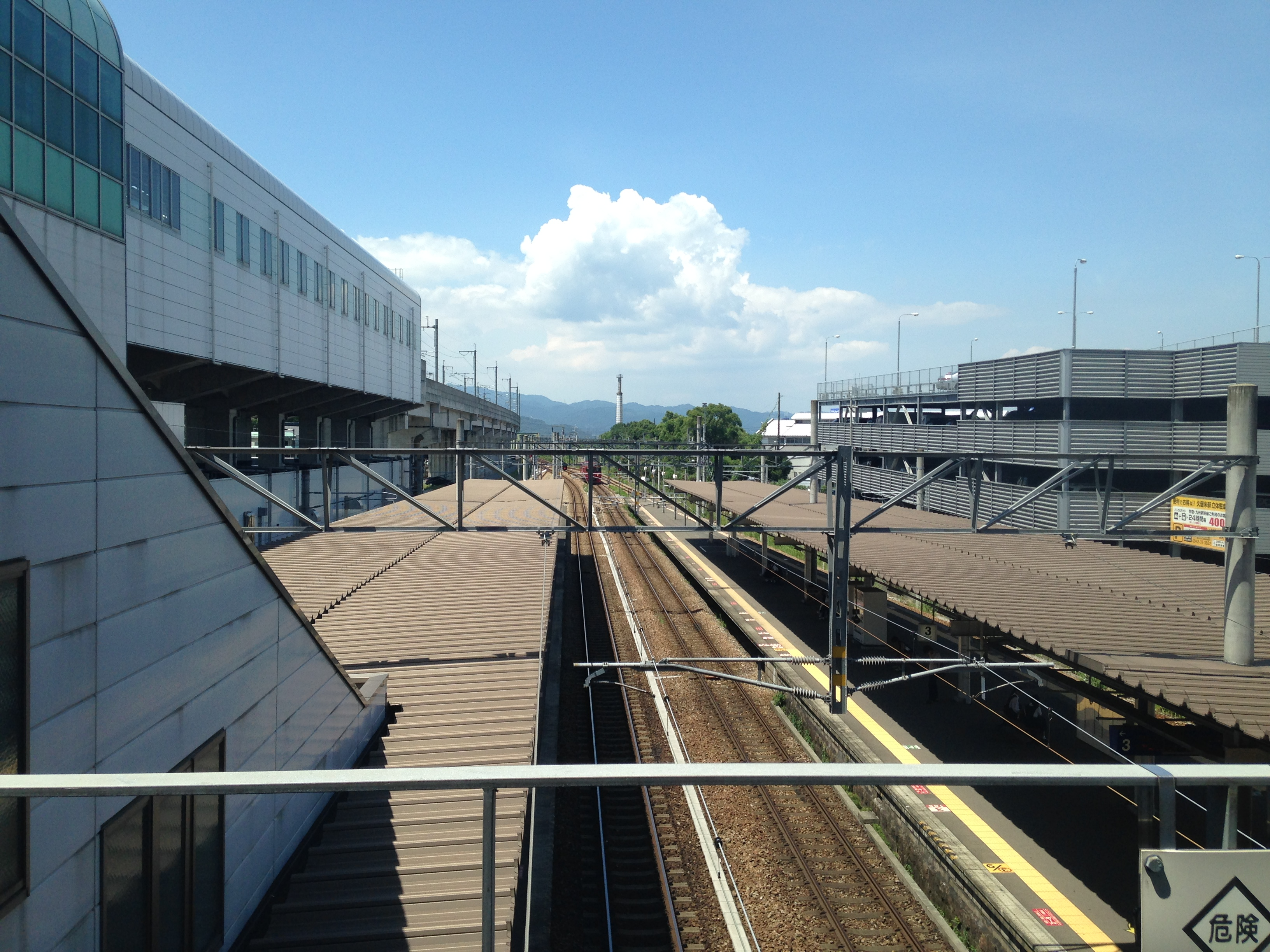 久留米駅の跨線橋より肥前旭方面を望む